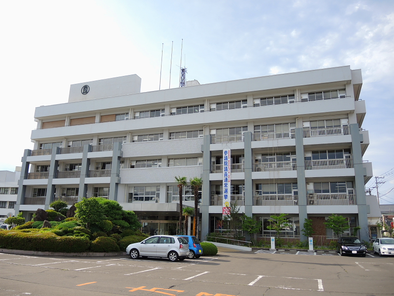 白石市役所本館